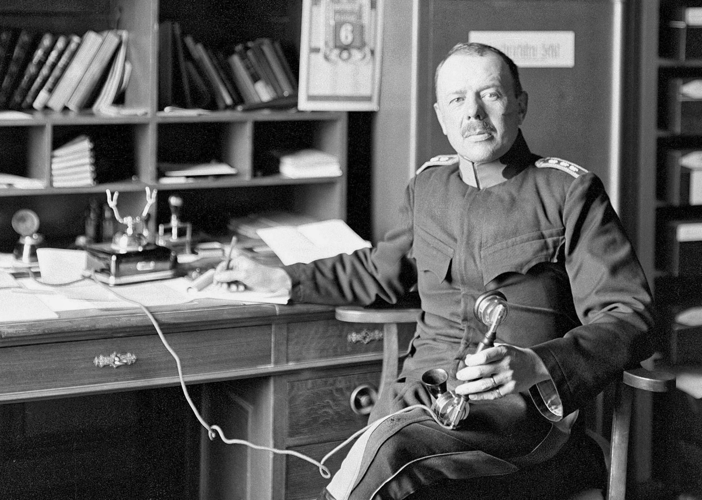 Oberst Von Wattenwyl Original: Negativ; Glasplatte; Silberbromid; 13x18cm Signatur: CH-BAR#E27#1000/721#14095#1099*